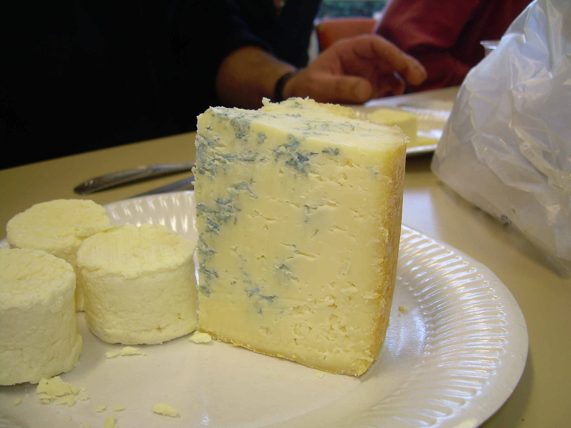 Fourme de Montbrison : fromage français du Forez, bénéficiant d'une AOC depuis 1972.